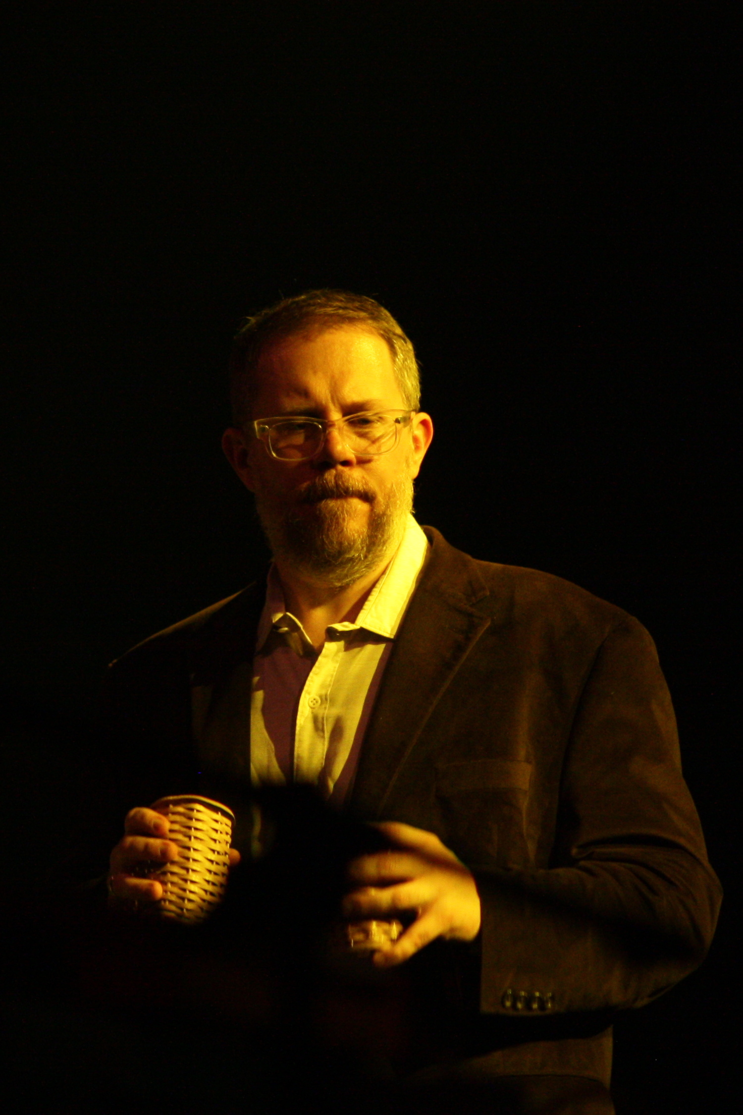 44. Deutsches Jazzfestival Frankfurt 2013: Matthew Lux